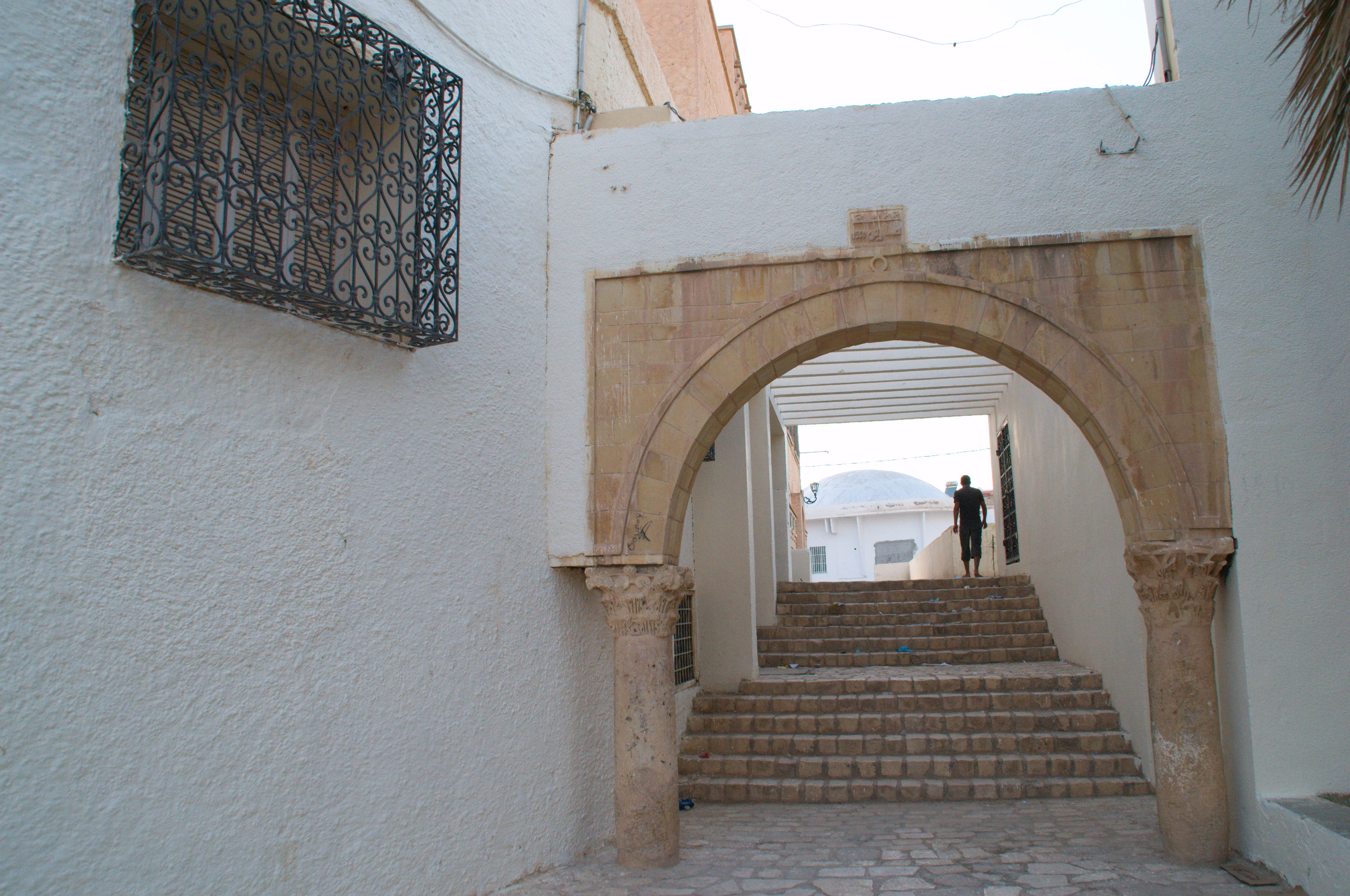 Vue de la médina de Gafsa, quartier El-Oued